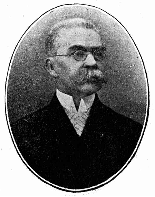 Ioan G Bibicescu, director al Băncii Naționale a României, România, 1910